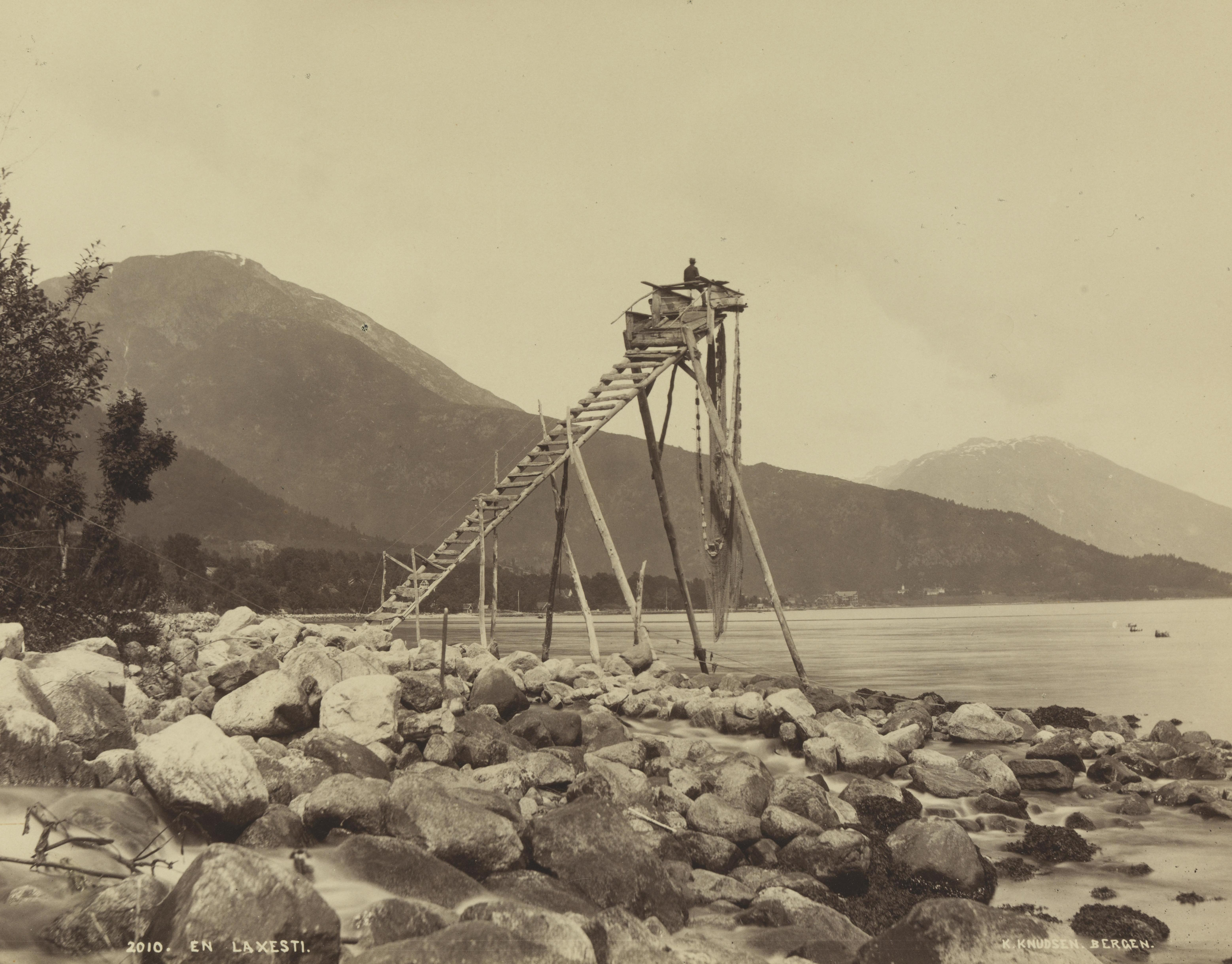 Bildet er hentet fra Nasjonalbibliotekets bildesamling Balestrand, Sogn og Fjordane